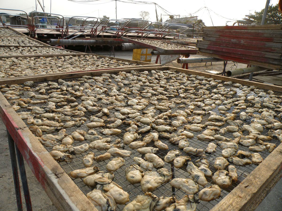 Dry oyster, Lau Fau Shan